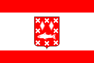 Bron